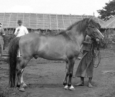 Stereonegatief. Hengst uit de Bataklanden